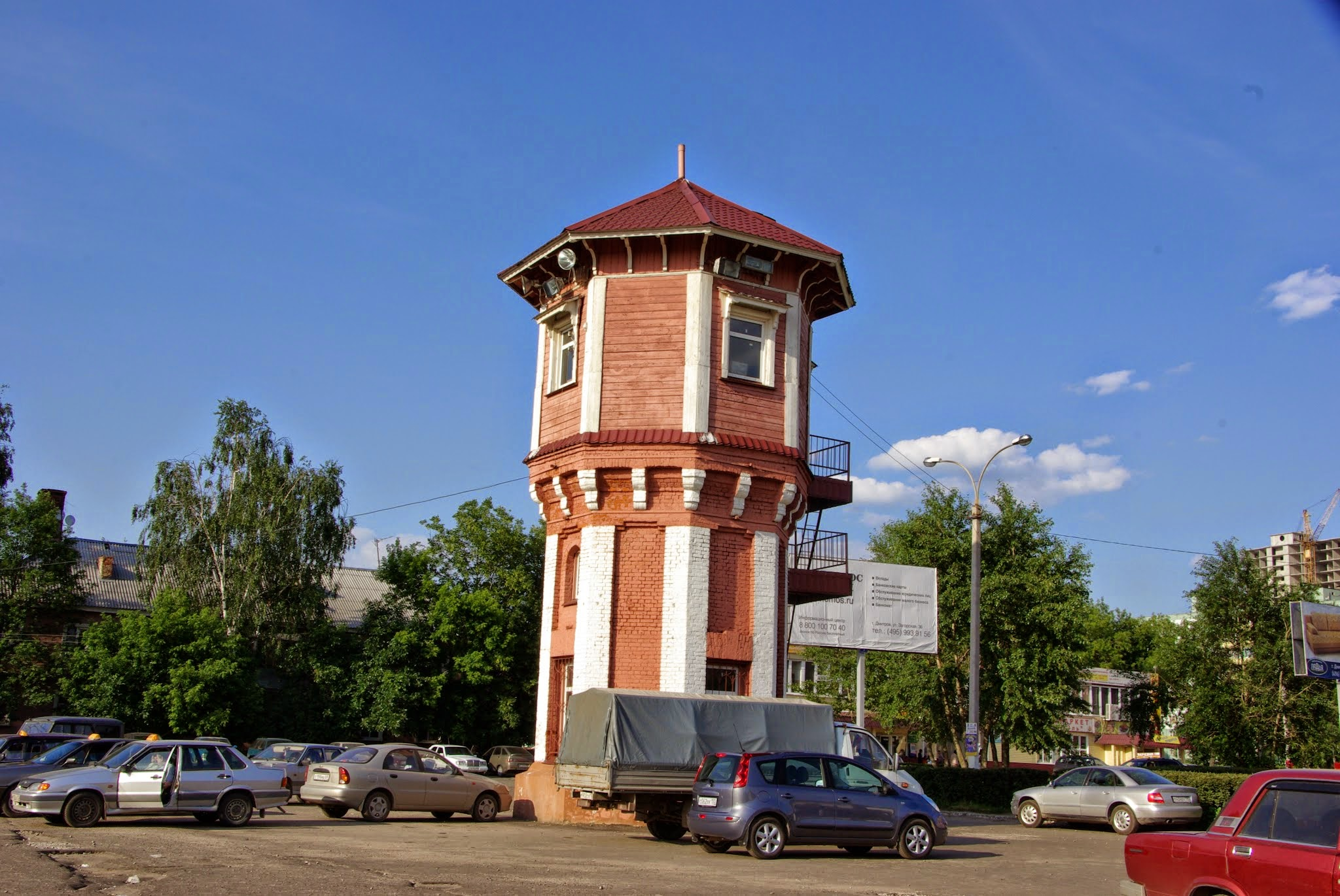 Башня водонапорная, Dmitrov, Moscow Oblast, Russia